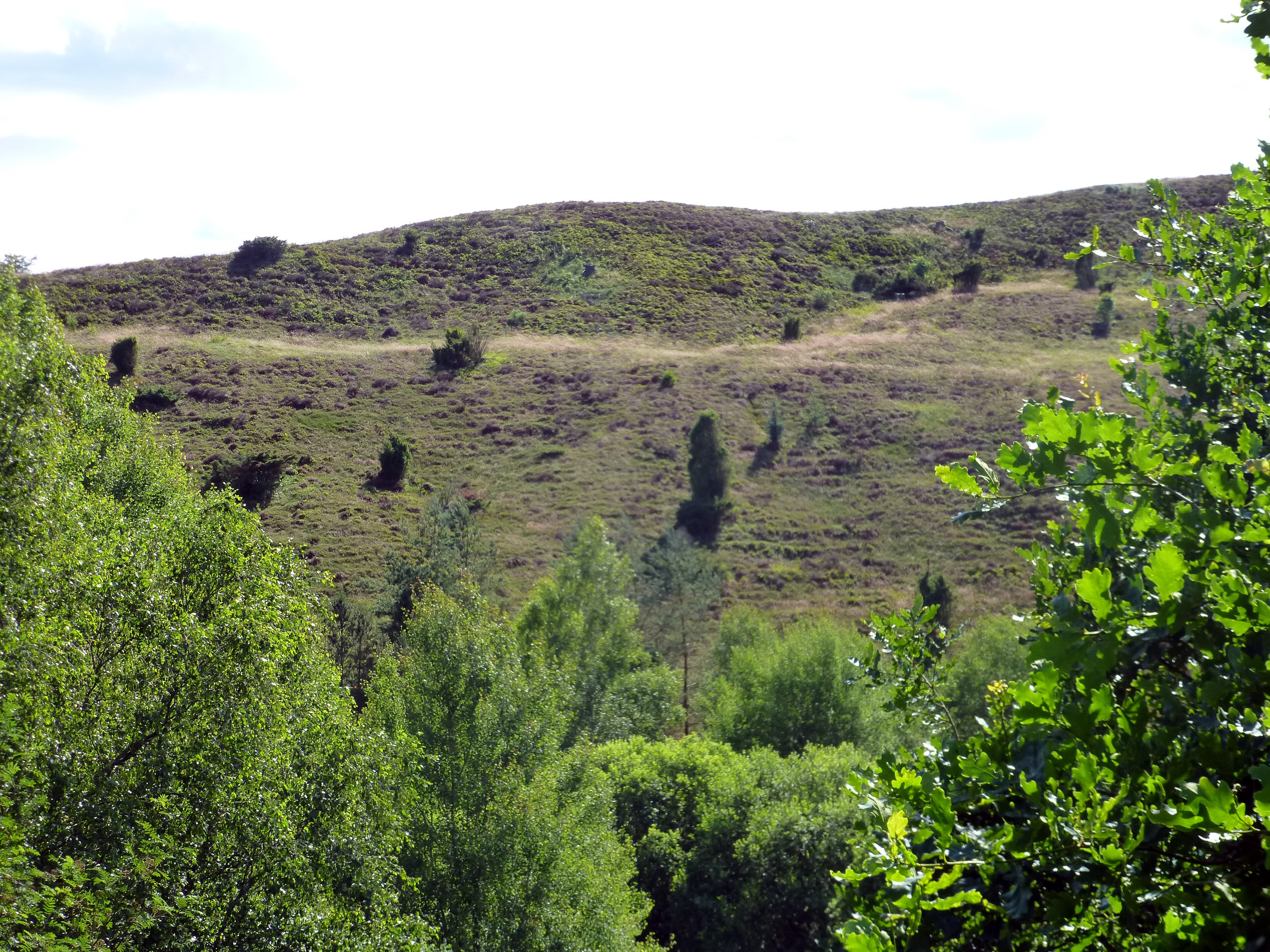 Bøgelund Banke syd for Vrads set fra naturstien på den nedlagte jernbane